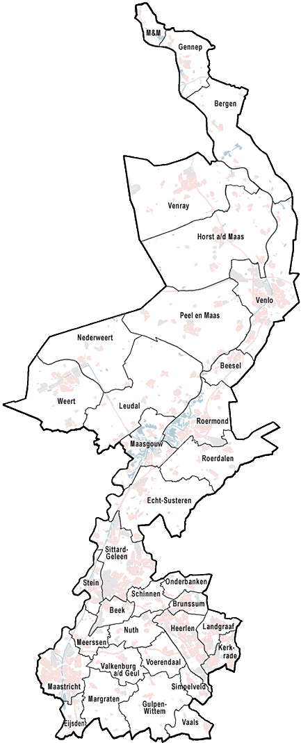 Provincie Limburg, met indeling van gemeenten (2010). Door Jan-Willem van Aalst, samengesteld uit publiek beschikbare geo-data: Referentie-ondergrond (kustlijn, steden, wegen) gerasterd uit de OpenStreet Map OSM. ( Inhoud is beschikbaar onder de Creative Commons Attribution-ShareAlike 3.0 license. Vectorgrenzen van gemeenten en regio's vrij ter beschikking gesteld met dank aan cartografen van brandweerregio's Hollands-Midden en IJsselland; gerasterd in Photoshop. Overige kenmerken op de kaart: eigen tekenwerk van Jan-Willem van Aalst, op basis van gerasterde gemeentegrenzen.